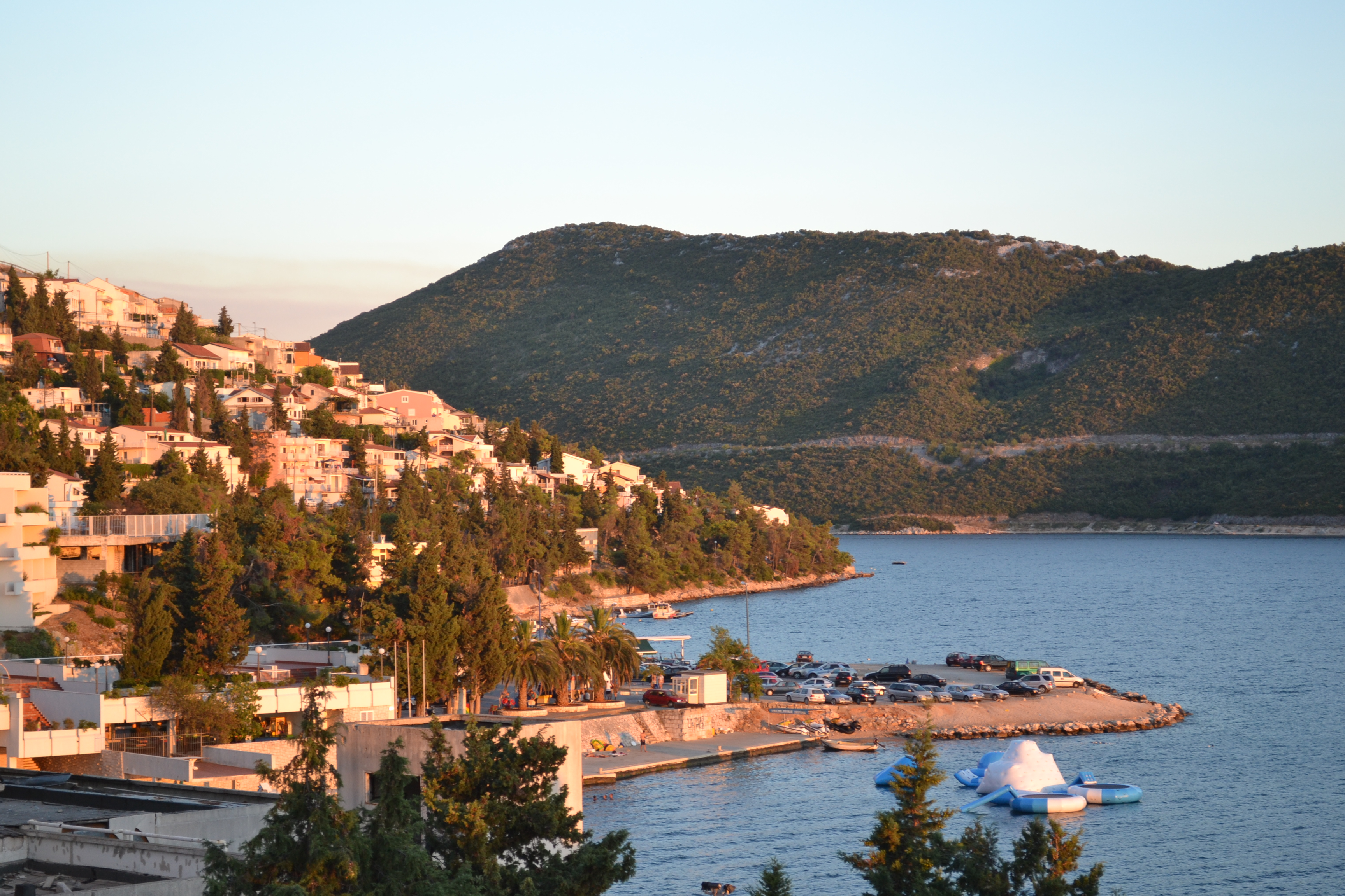 Неум